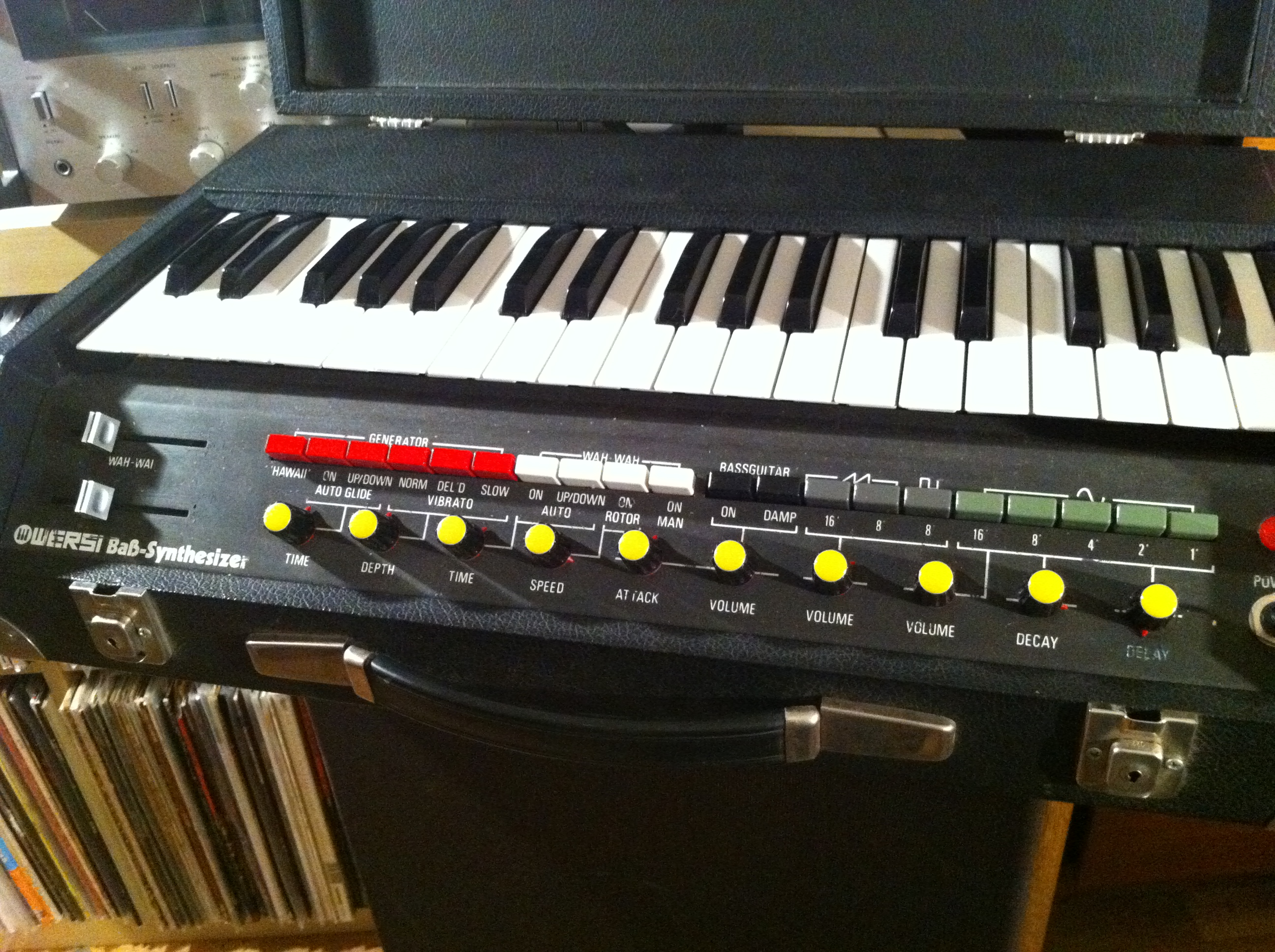 Wersi AP6 Baß Synthesizer